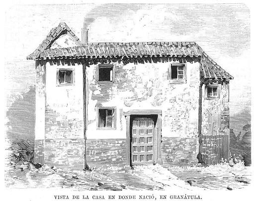 Casa donde nació Baldomero Espartero, en Granátula, grabado publicado en la revista española La Ilustración Española y Americana.